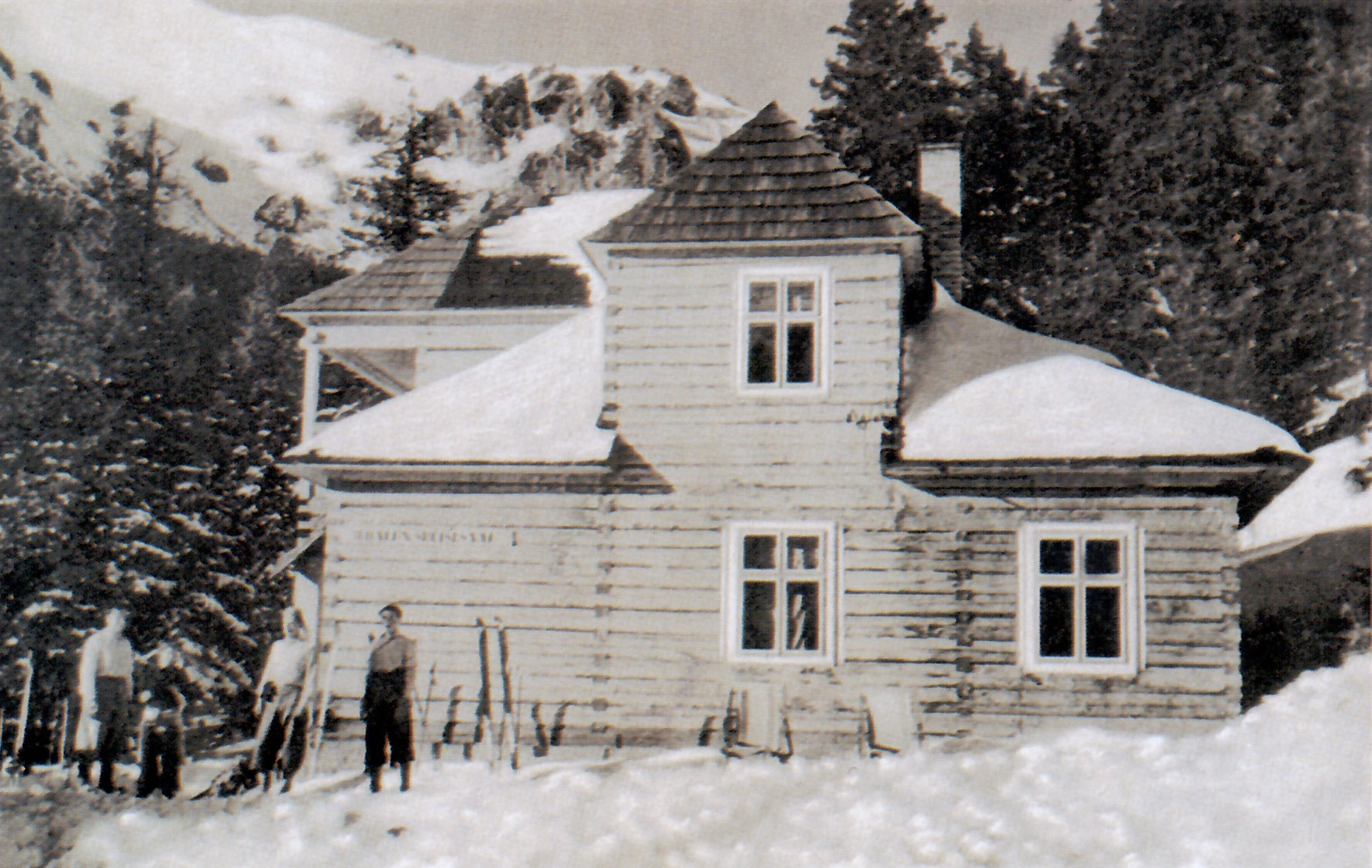 V Doline Bielej vody vo Vysokých Tatrách, na Slovensku na Žeruchovej poľane postavil v roku 1903 Uhorský karpatský spolok útulňu. v roku 1923 už neslúžila turistom. Po nej na tom istom mieste v roku 1933 postavil novú chatu Július Tardík. V roku 1958 bola asanovaná.